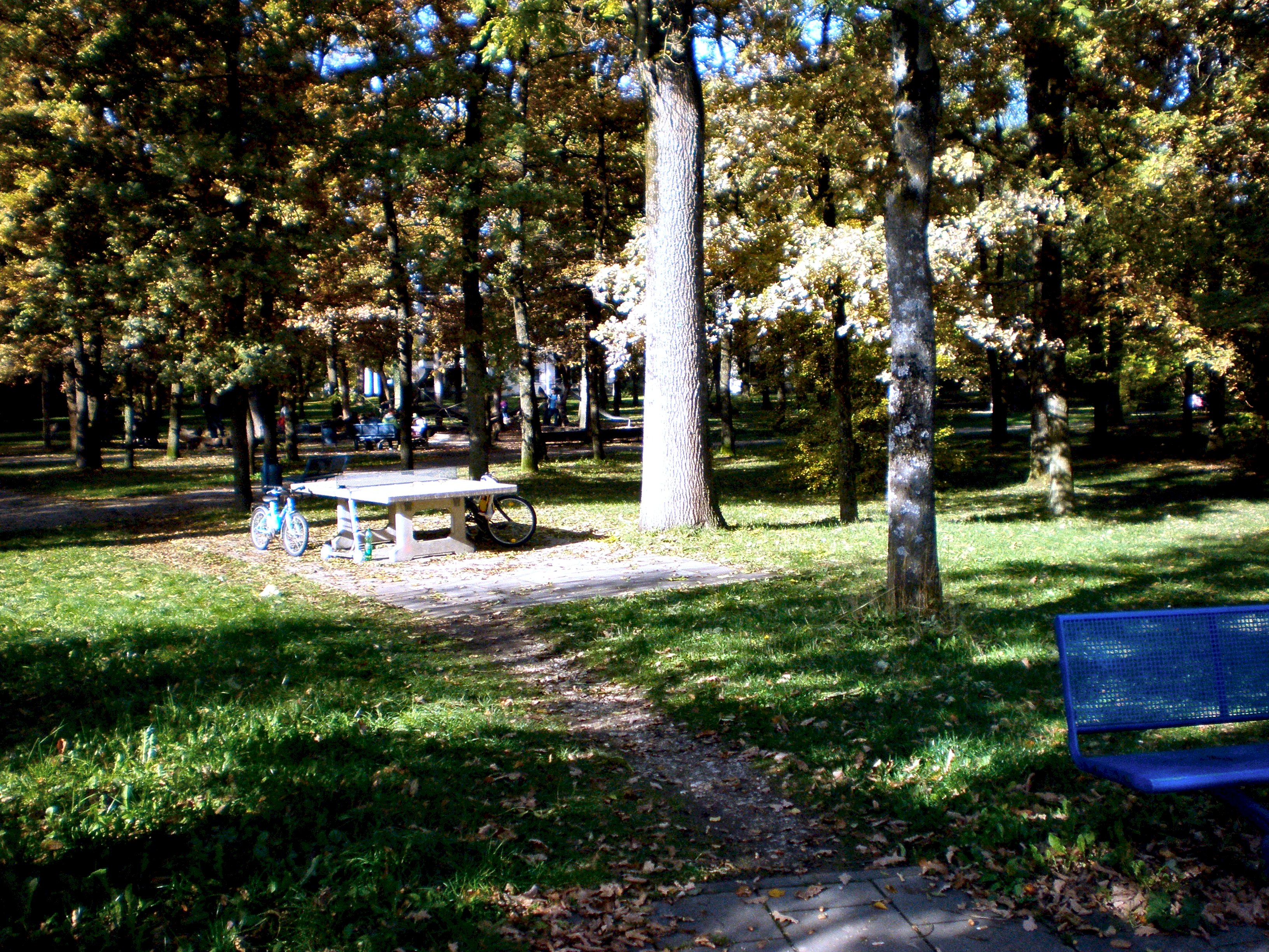 Unterschleißheim, Lohwaldpark 1